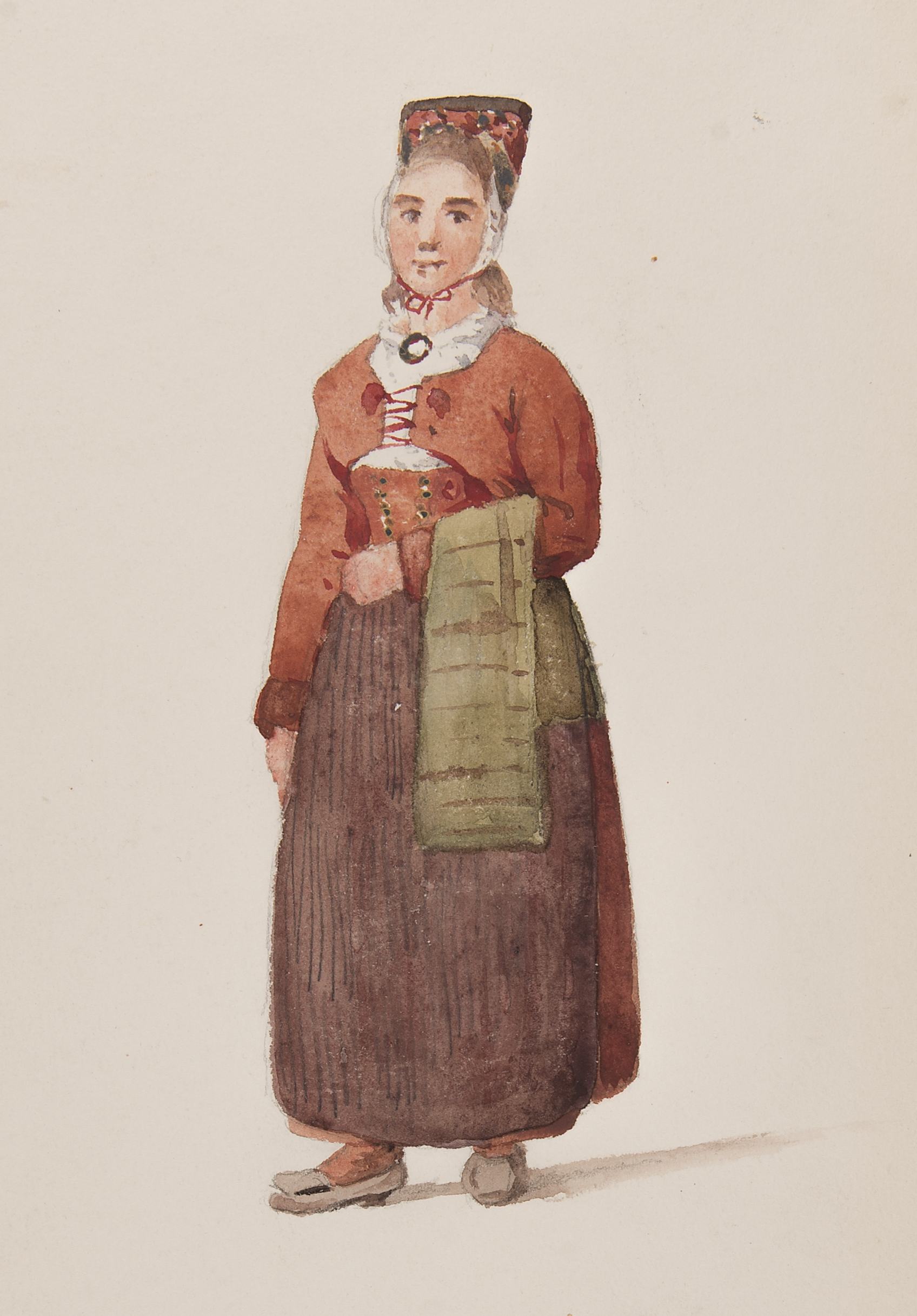 Dräkt. Kvinna framifrån i helfigur, Häverödräkt. Akvarell i storformat av Joseph Magnus Stäck. Depicted place: Q10717114 (Q10717114) (Härad), Väddö (Ort), Q10531909 (Q10531909)